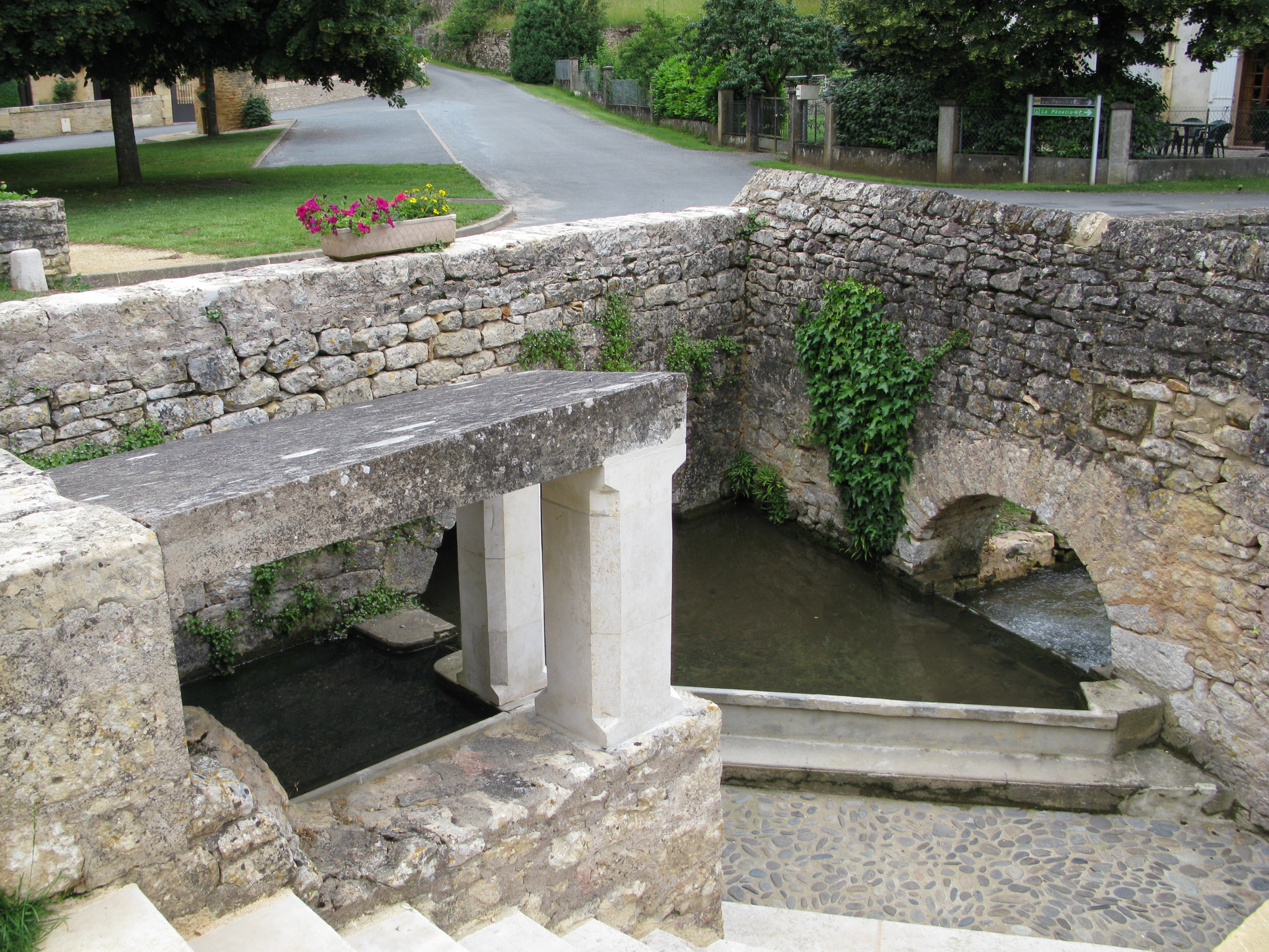 Lavoir de Paunat, alimenté par Le Paunat